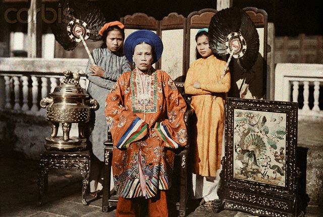 中文（香港）: 育德帝長女美良長公主阮福媄葻